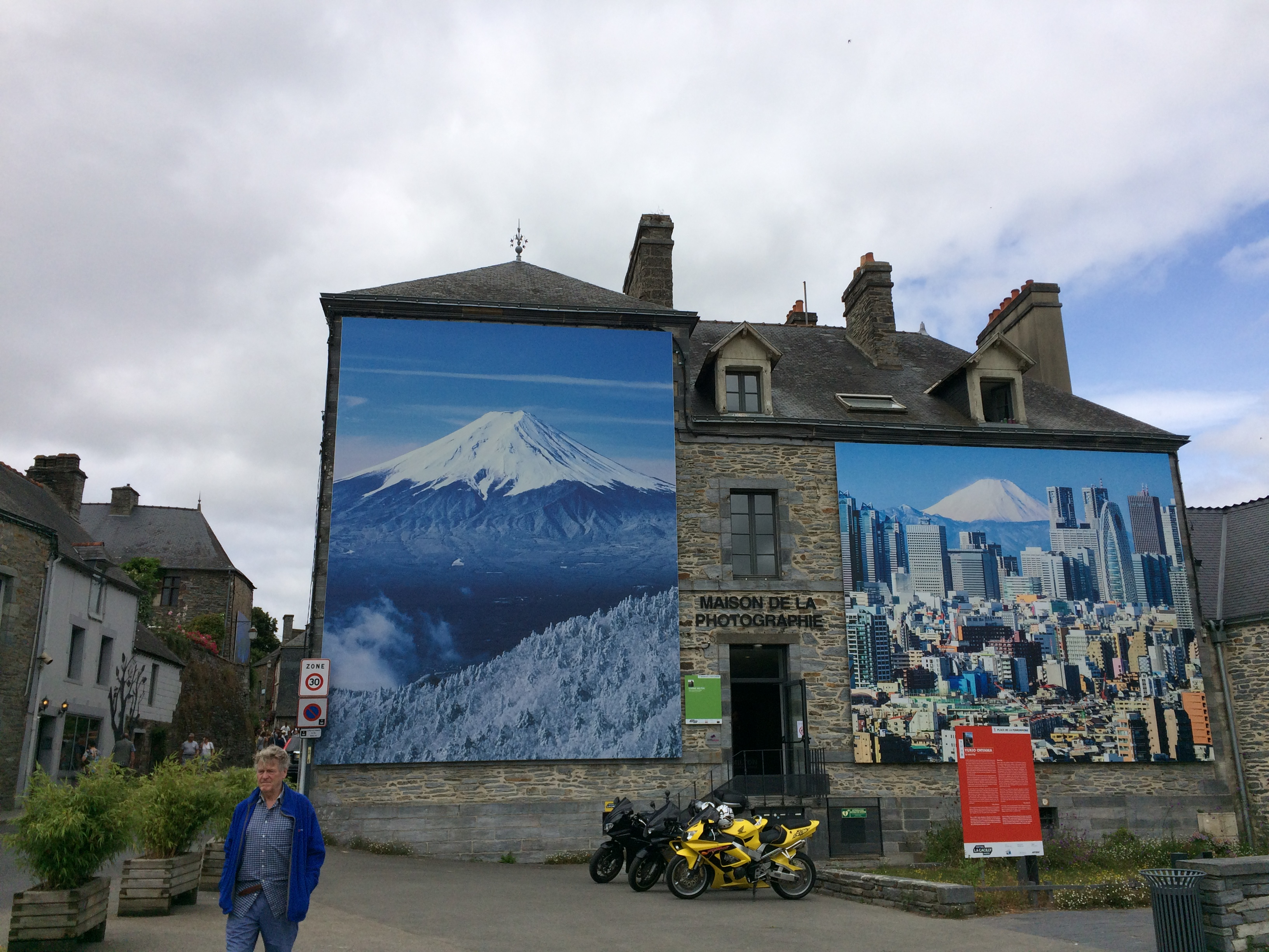 Autour du Festival de photographie de La Gacilly (Morbihan, Bretagne) en août 2016, place à coté de la maison d'information